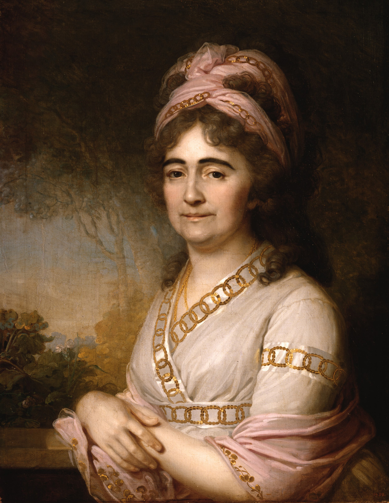 Арбенева Марфа Ивановна (урождённая Козлова, 1741-1804). Супруга И.И. Арбенева. Приходилась теткой слепому поэту И.И. Козлову. В доме Арбеневых в Петербурге бывали поэт Г.Р. Державин, граф А.С. Строганов, драматург и поэт А.Я. Княжнин. Их дочь Екатерина была замужем (с 08.05.1805) за Александром Ивановичем Ефимовичем.